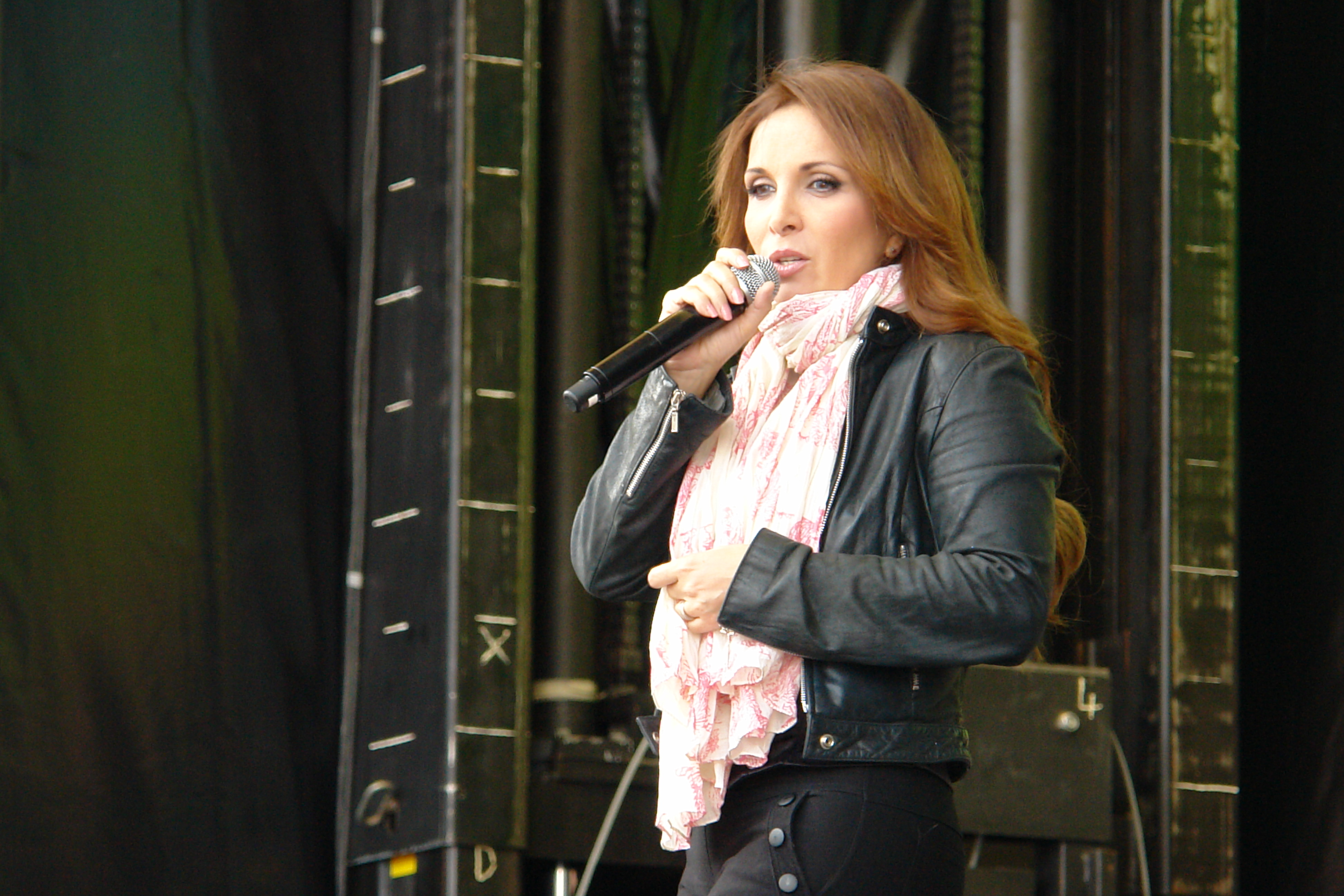 mini concert au beau vélo de ravel.